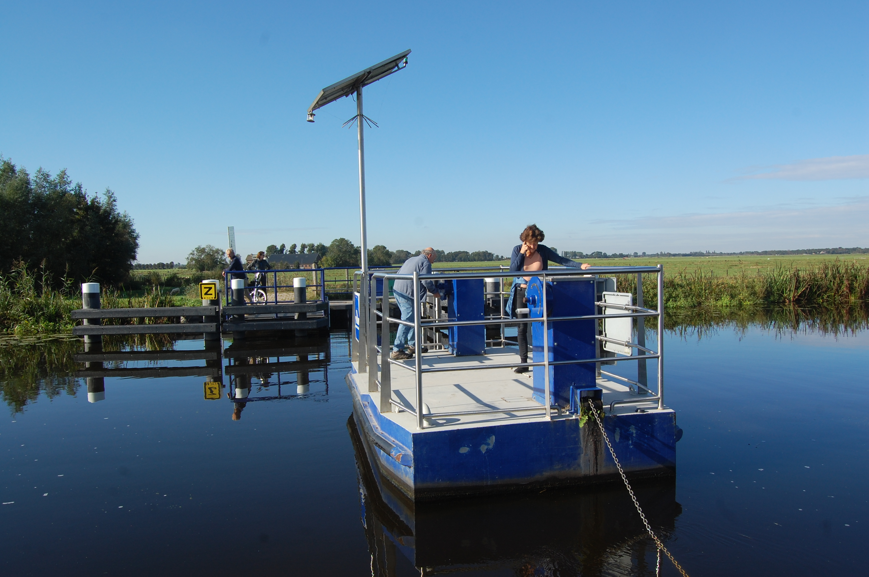 Handbediende veerpont voor fietsen en voetgangers over de Grecht bij Toegang, 3474 KR Zegveld